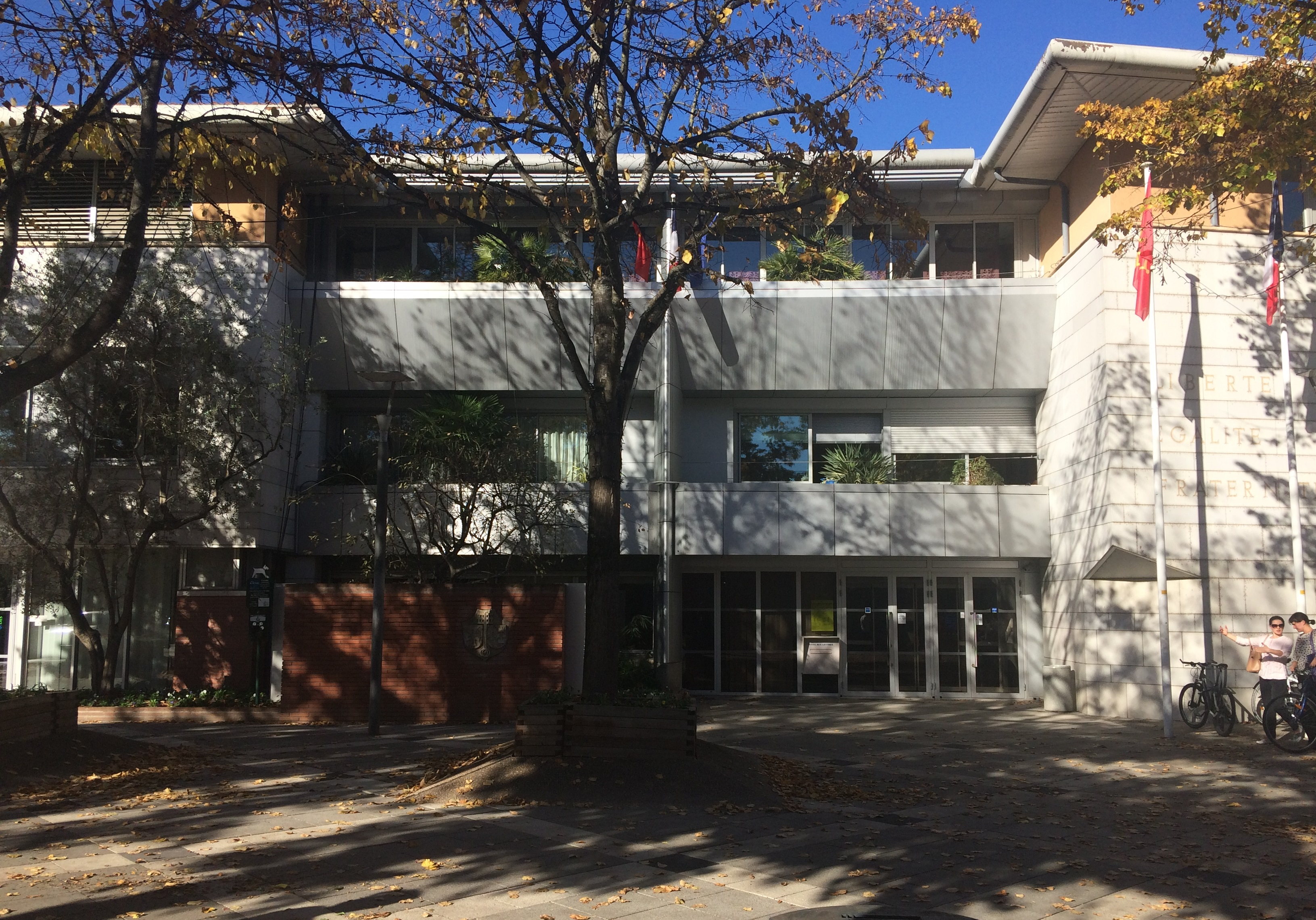 Mairie de Blagnac - octobre 2017.